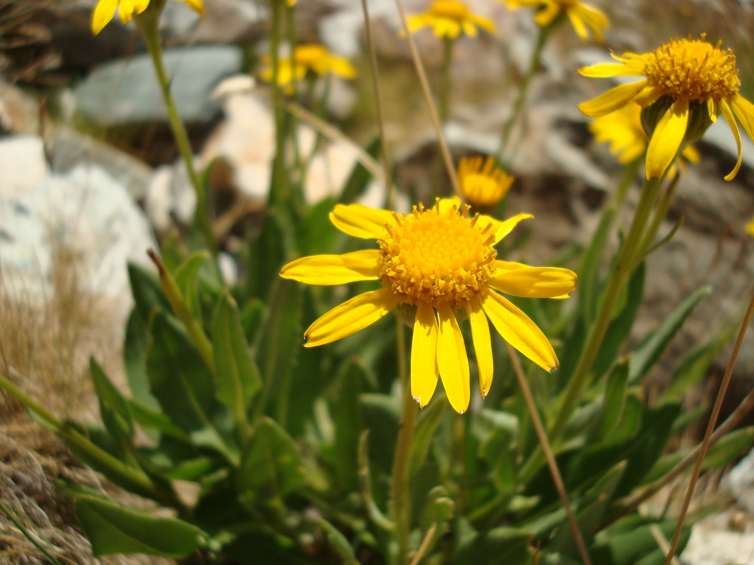 Planinska arnika